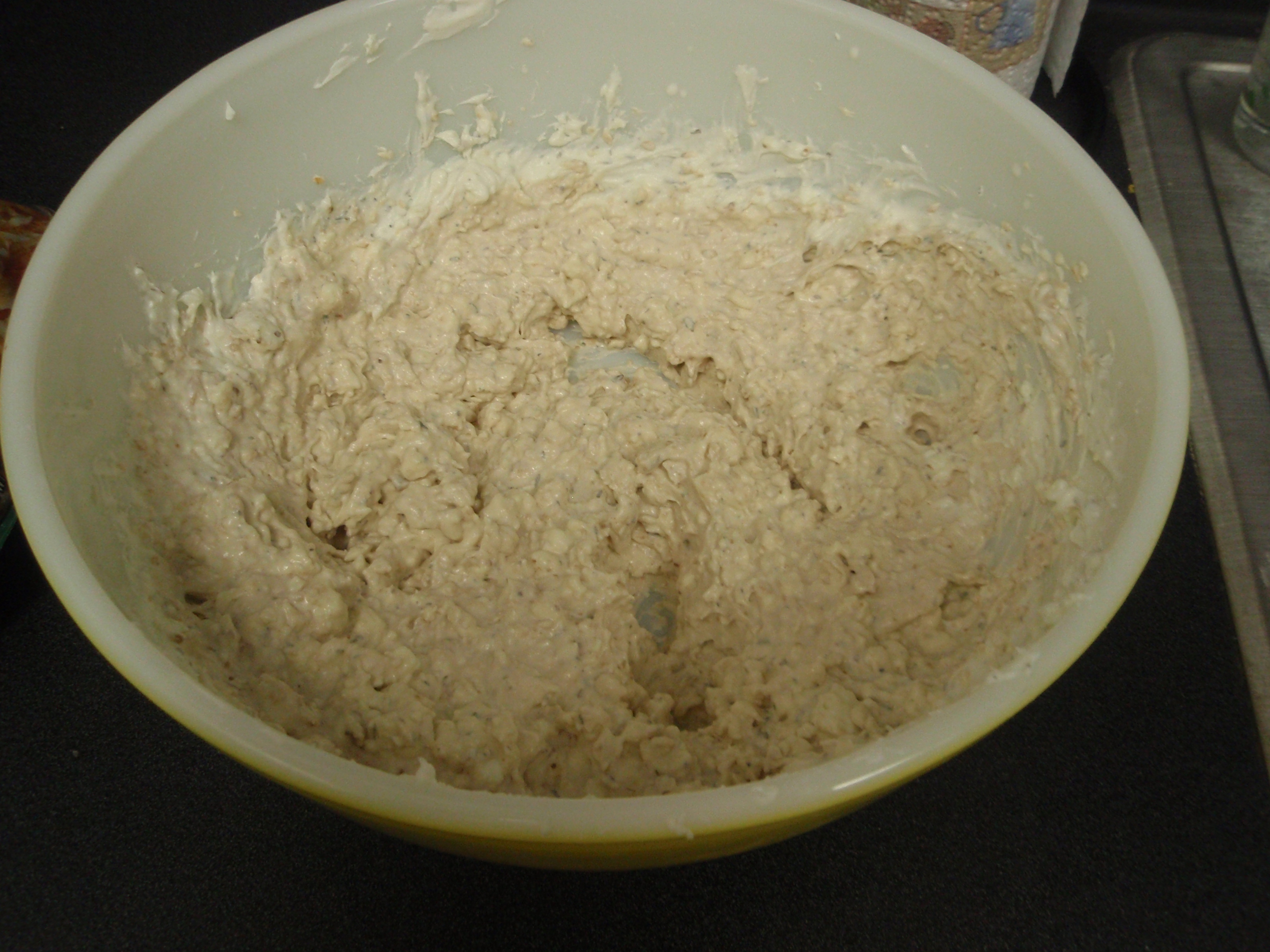 Cachat provençal